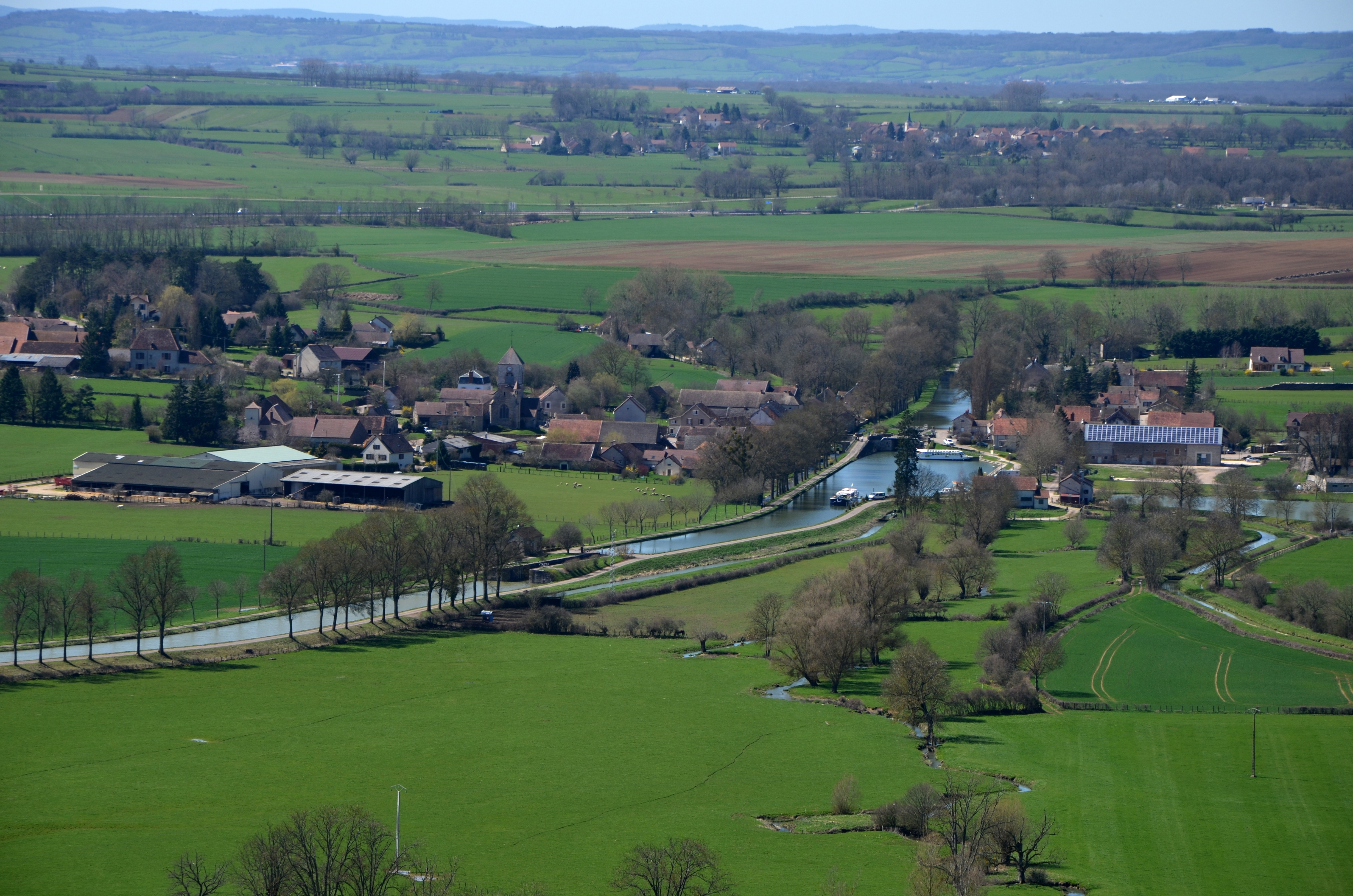 Vue vers l'ouest depuis Châteauneuf (Côte-d'Or, Bourgogne, France). Au premier plan, le canal de Bourgogne à Vandenesse-en-Auxois : écluse du Fourneau n° 9 et, un peu plus loin et plus à droite, bassin portuaire et écluse de Vandenesse ; encore un peu plus loin sur le canal, on aperçoit une partie de l'écluse de Vachey n° 10 juste avant que le canal ne tourne vers la droite (marqué par le ruban d'arbres). Derrière le village de Vandenesse, l'autoroute A6 traverse le champ de l'image. En arrière-plan vers la droite de la photo (derrière l'autoroute), le village de Maconge. Les bâtiments aux toits blancs en haut à droite de la photo sont ceux du karting-club de Maconge ; à leur gauche on aperçoit la petite bâtisse de l'aérodrome de Pouilly-Maconge dont la piste passe devant le karting-club. A l'horizon, la côte nord-est du plateau du nord-Morvan.